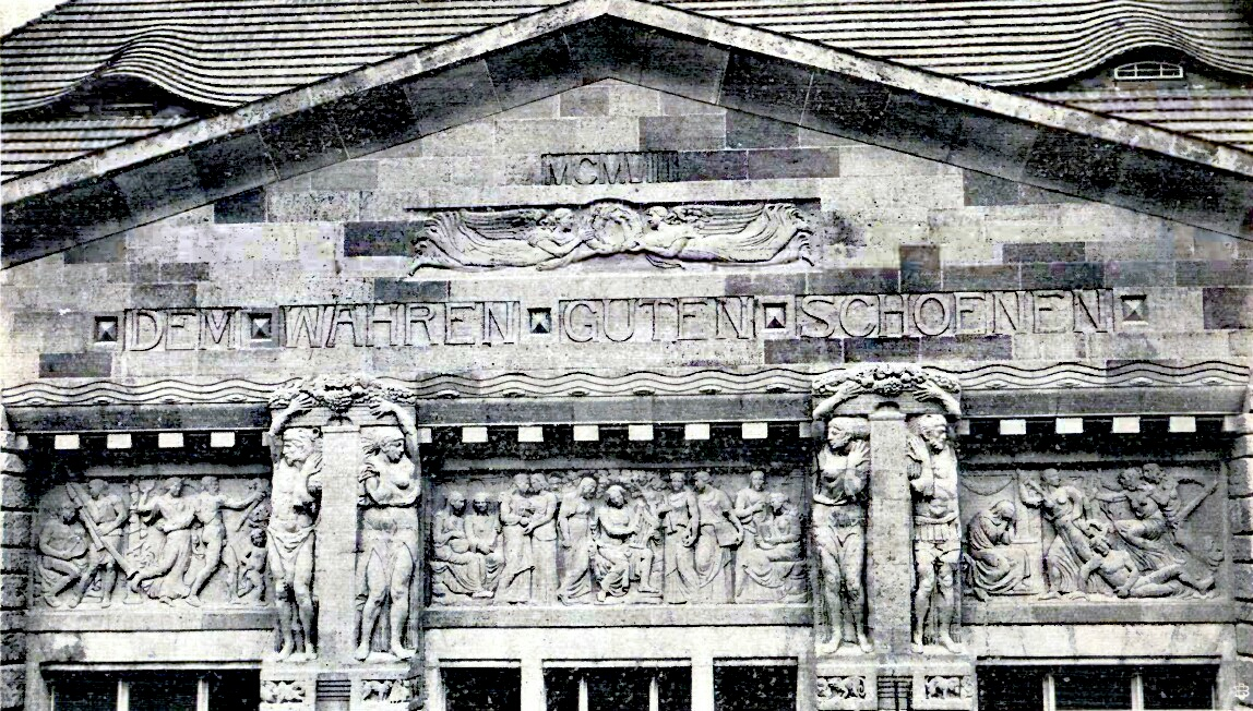 Die Reliefs an der Fassade des Theaterneubaues.